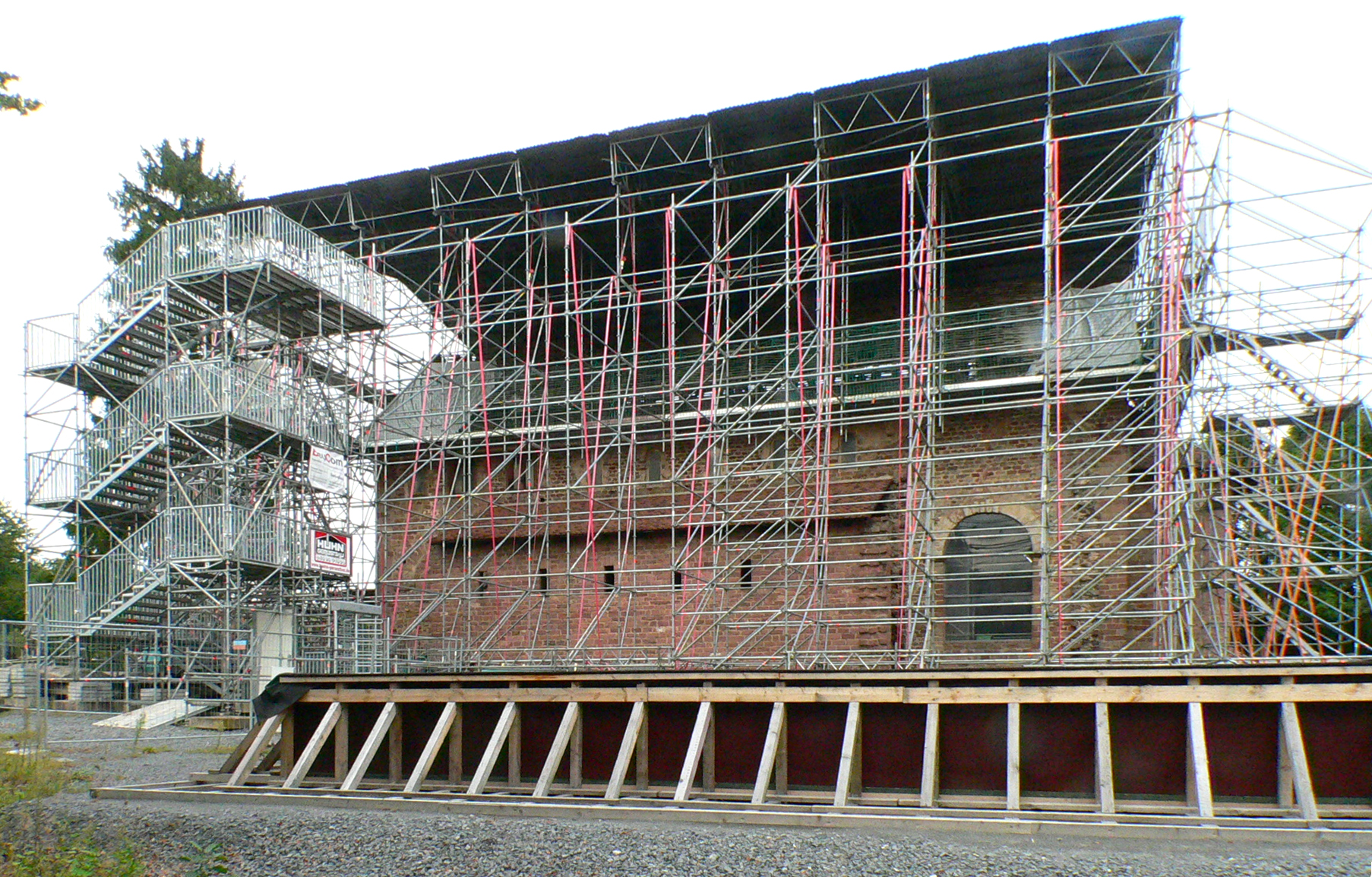 Einhardsbasilika in Steinbach (Michelstadt), Odenwald, Deutschland. Gerüst mit Schutzdach 2008